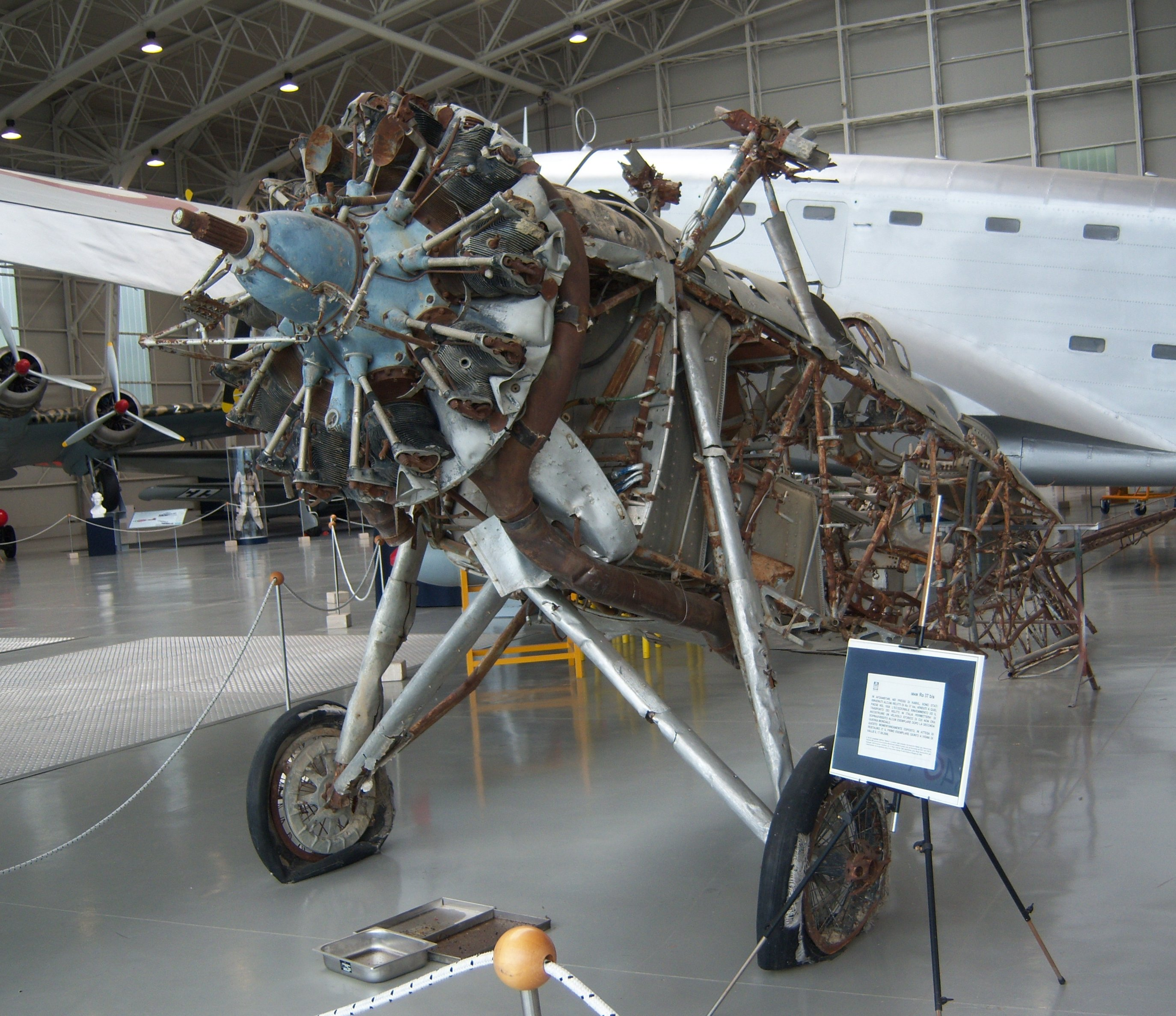 IMAM Ro.37 im Museo storico dell'Aeronautica Militare di Vigna di Valle